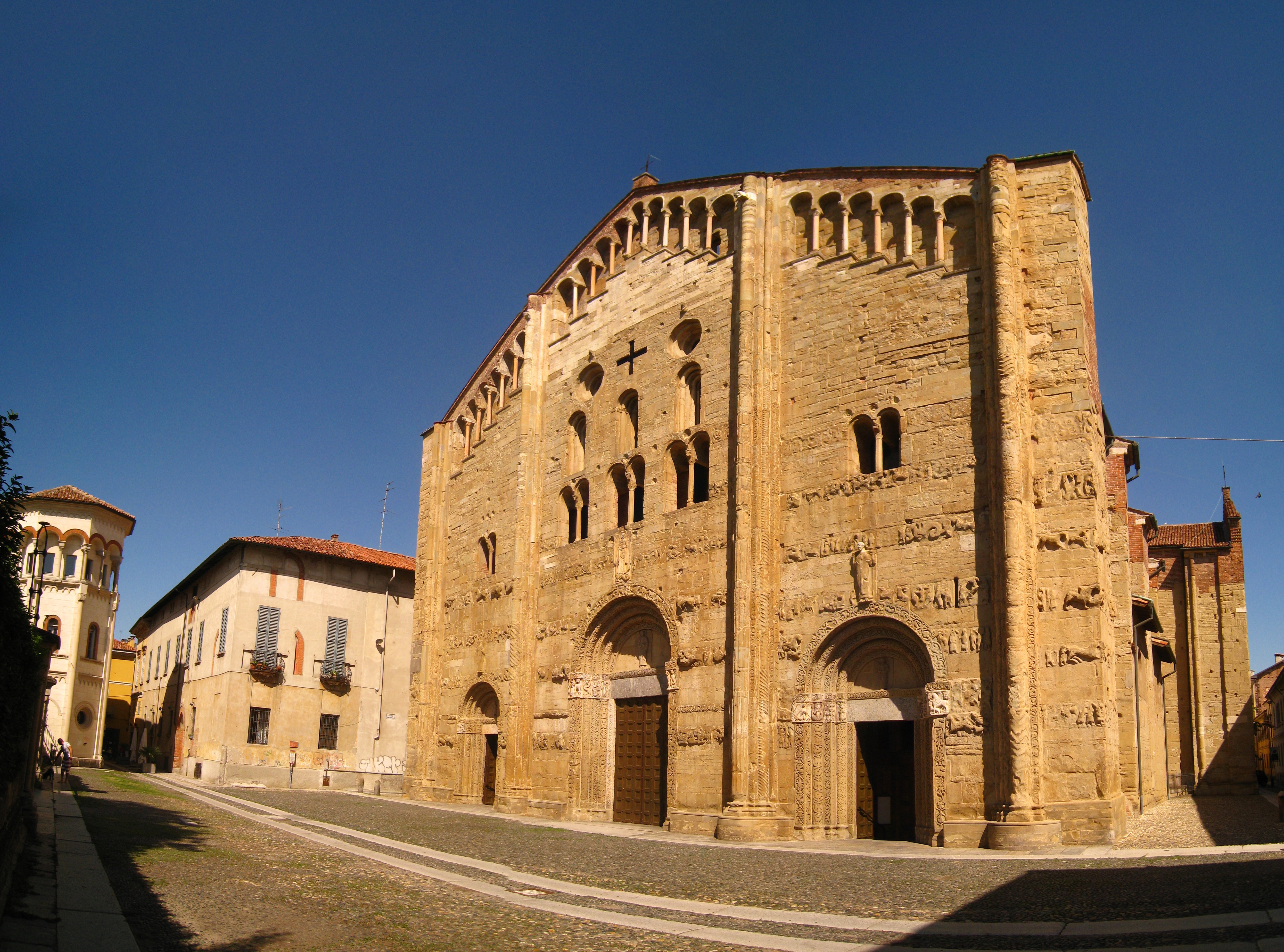 Basilique de San Michele Maggiore, encore une église (je vais pas dire qu'il n'y a que ça, mais en fait il n'y a que ça). Très beau spécimen d'art roman, en tout cas.